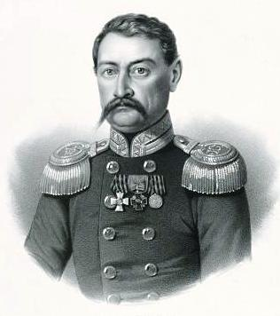 Kniaz' Ivan Osipovich Shalikov, Maior